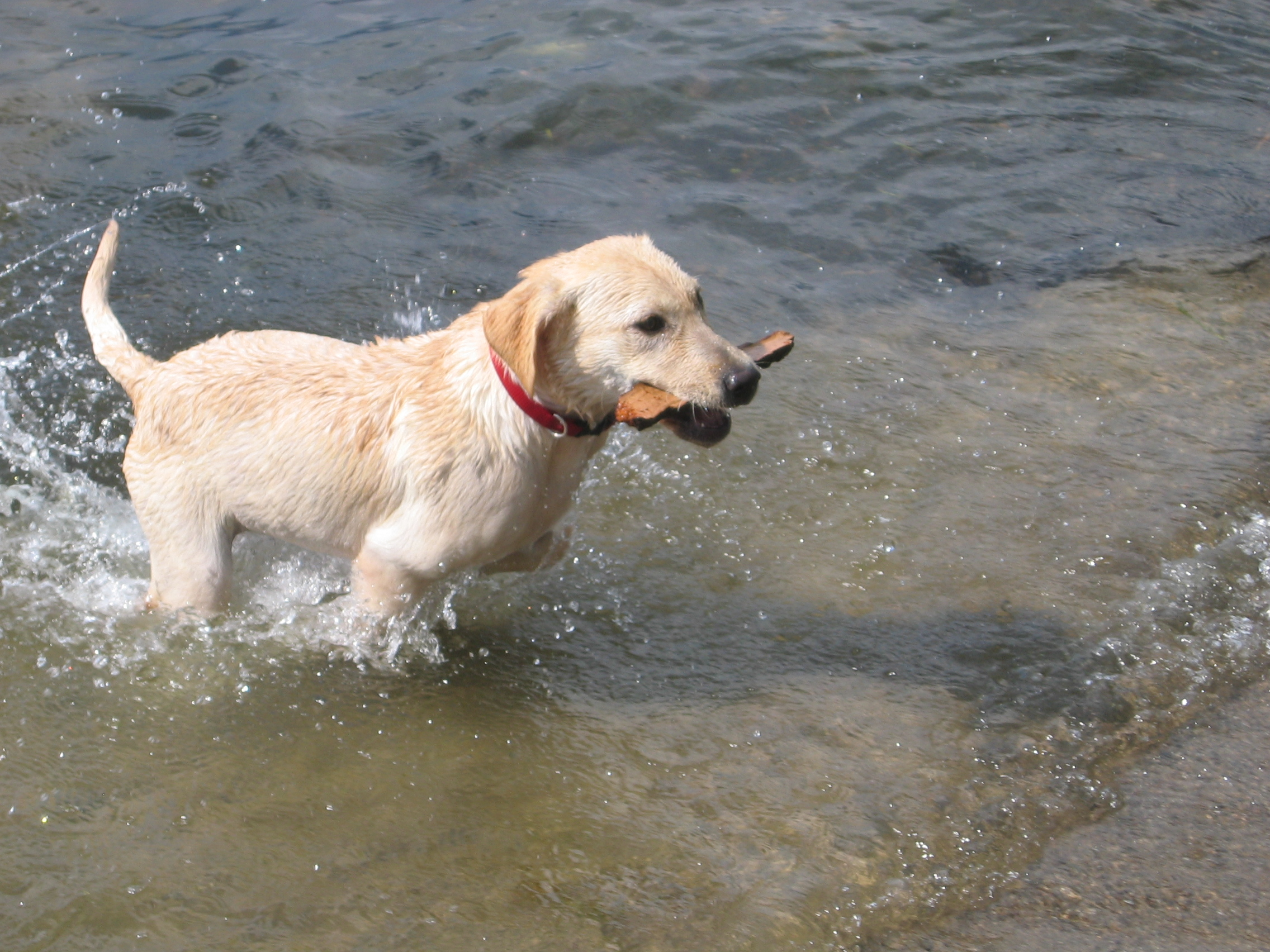 A Labrador Retriever.